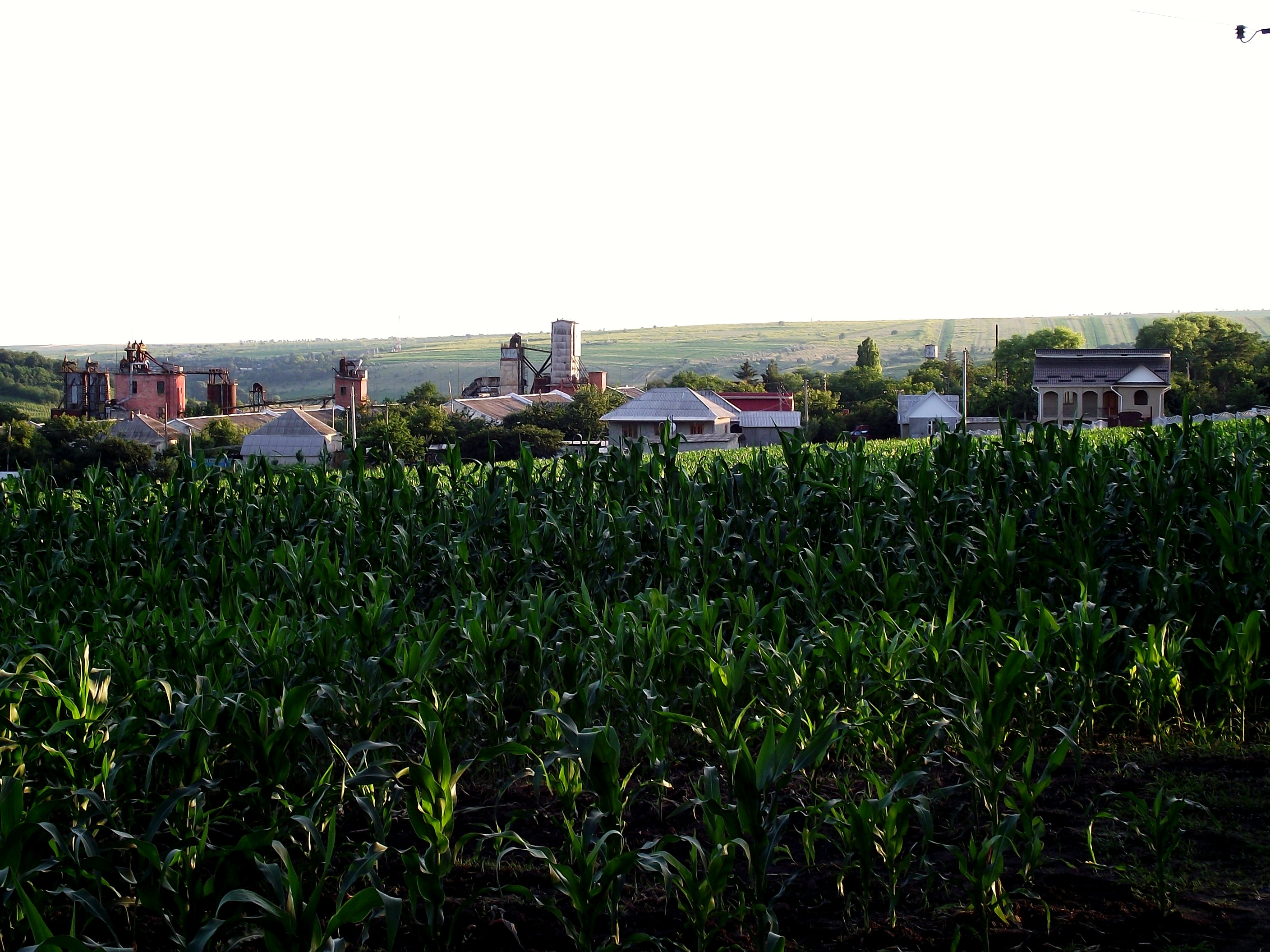 R33, Lăpuşna, Moldova